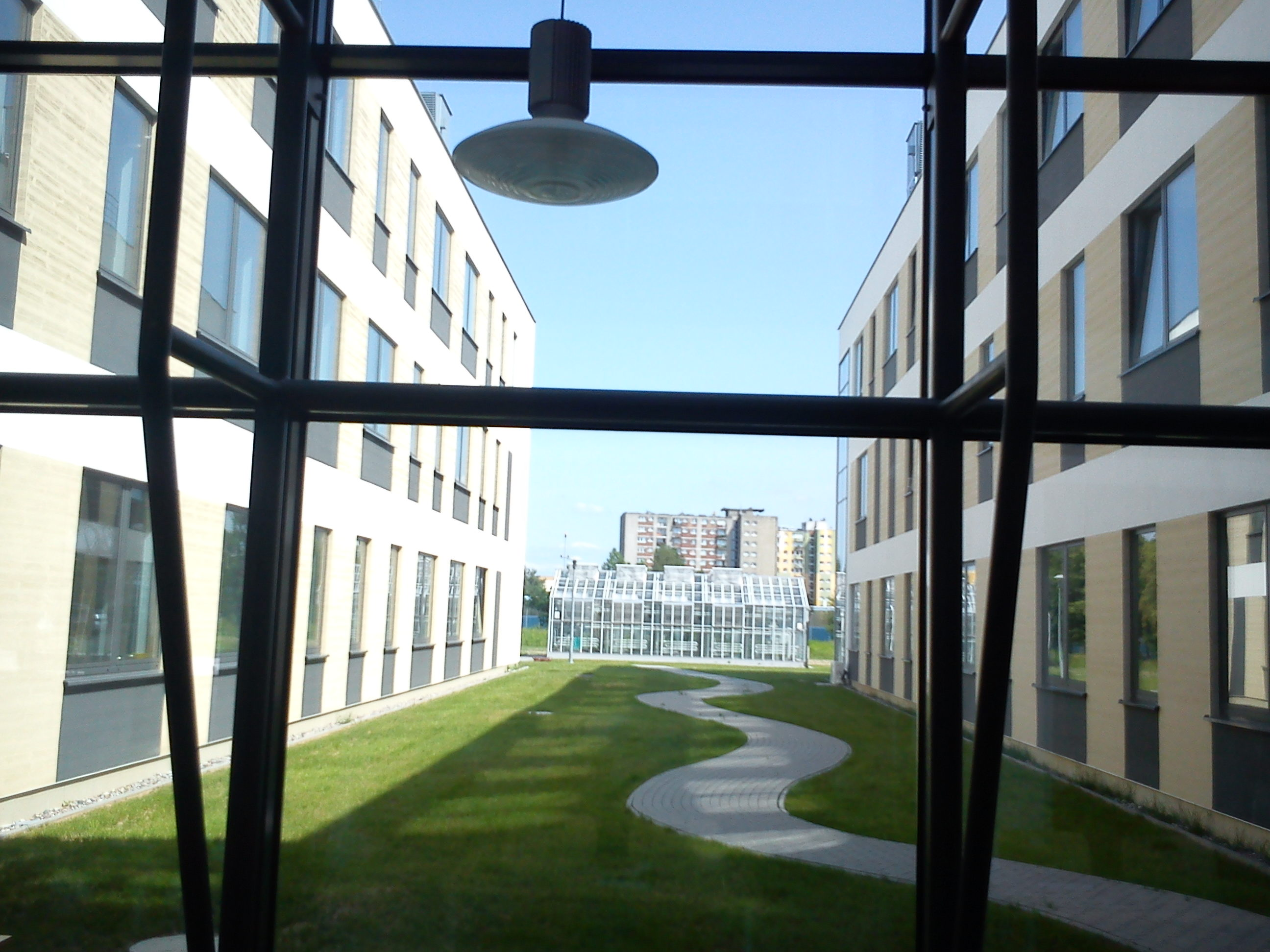 Biocentrum Uniwersytetu Przyrodniczego, Poznań, ul. Dojazd.